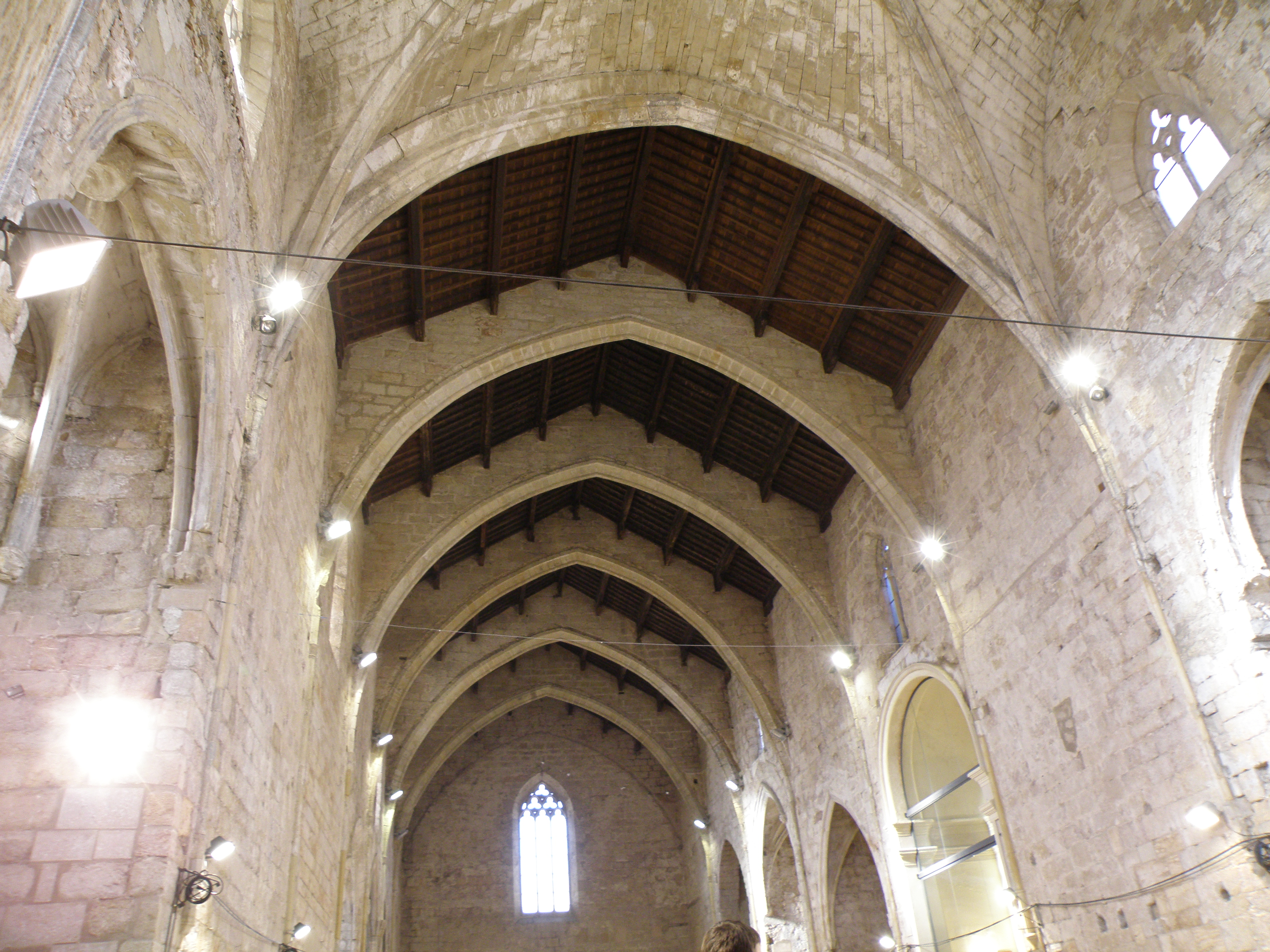 Vista interior de l'antic Convent de Sant Francesc de Montblanc